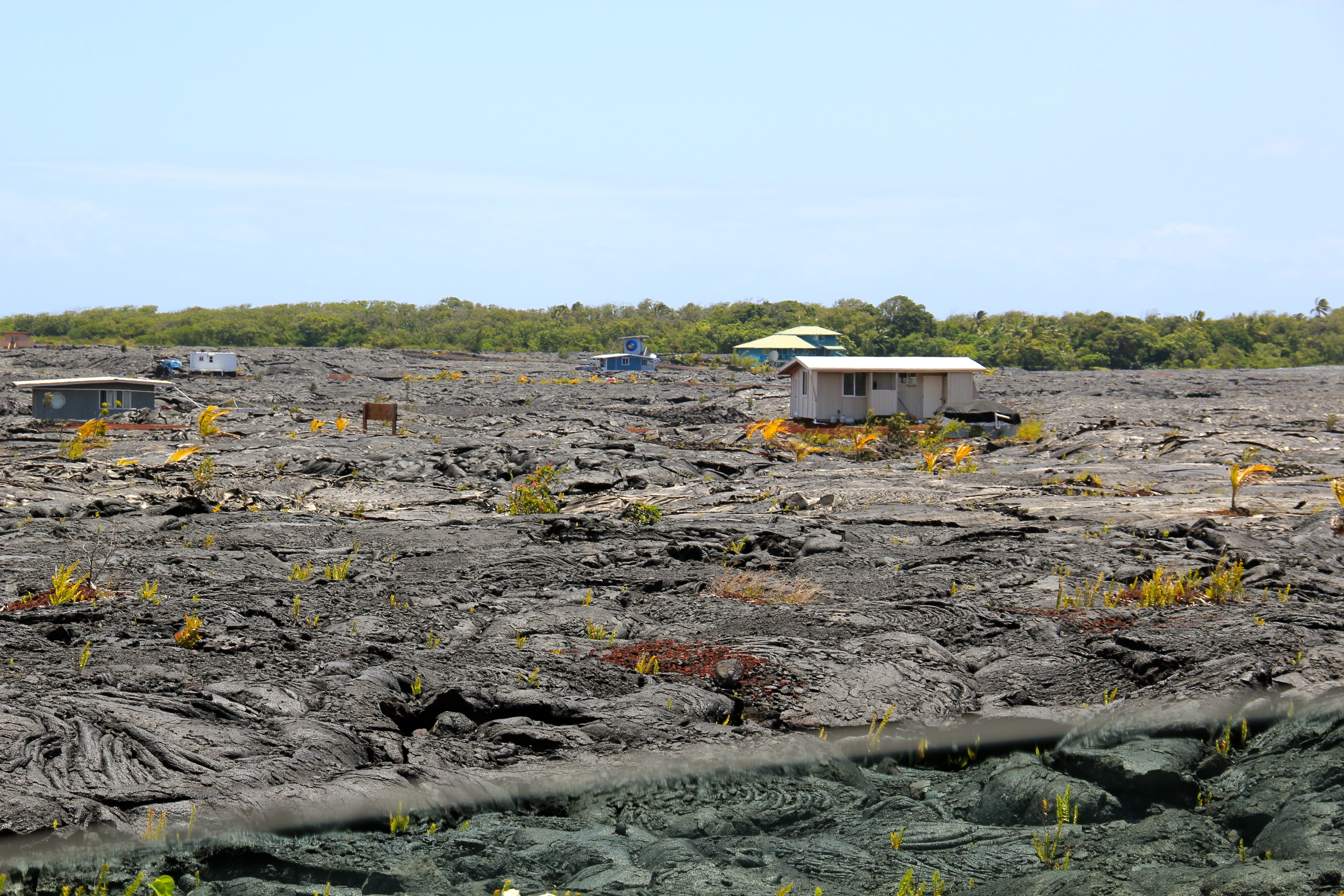 Kalapana in 2012.